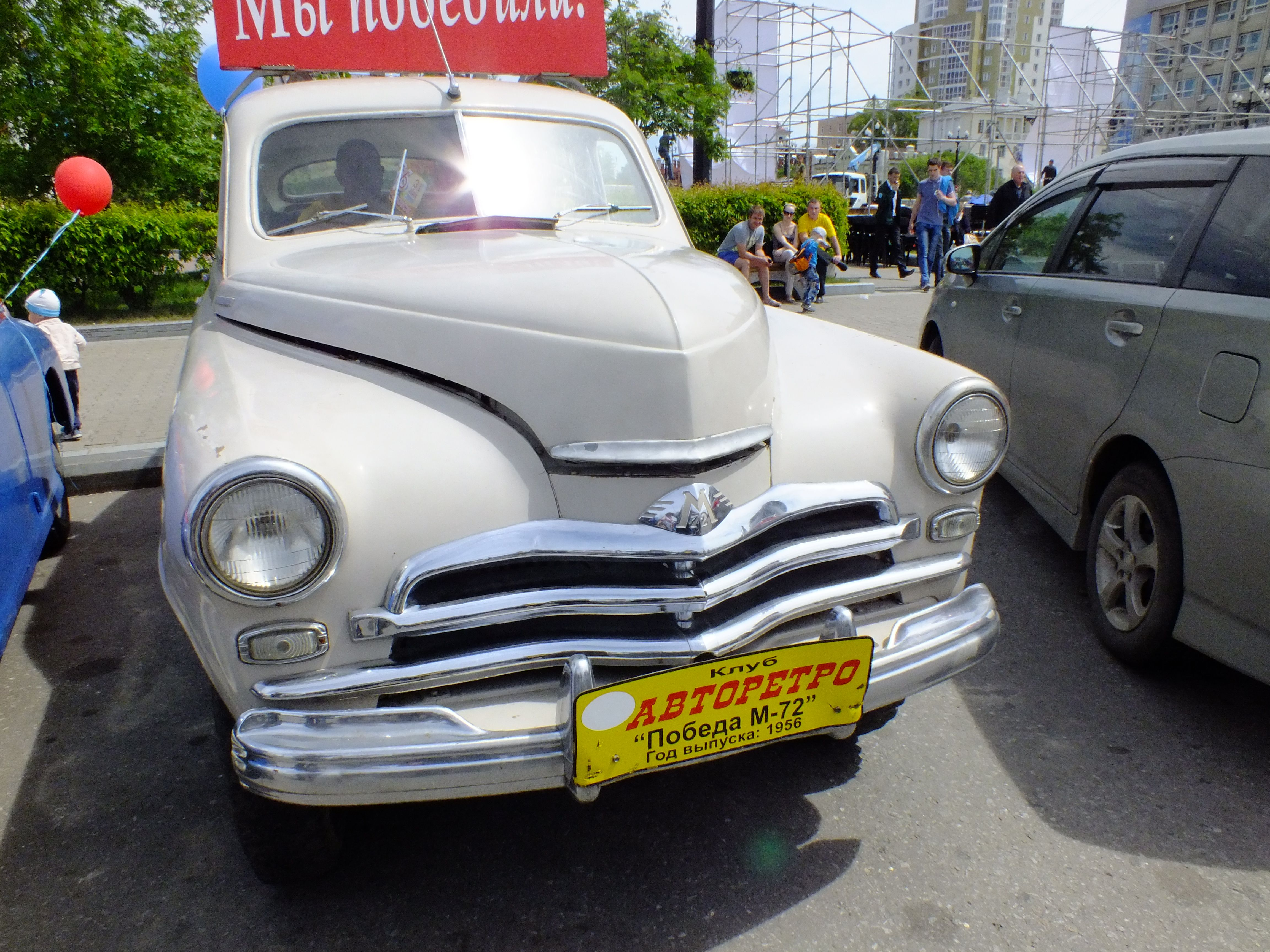 GAZ-M-72